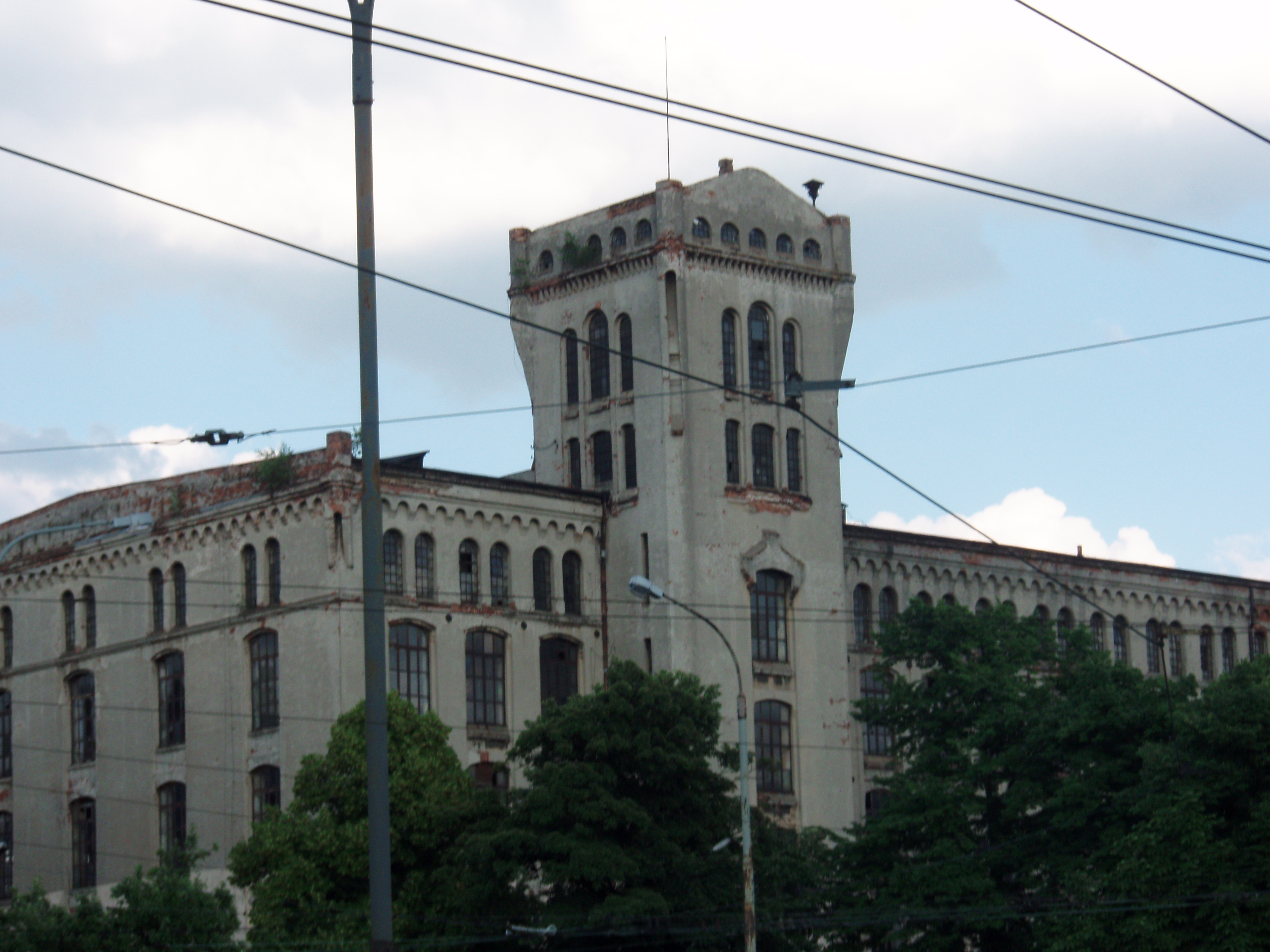 Widok na kompleks były fabryczny na rogu ulic Przybyszewskiego i Kilińskiego